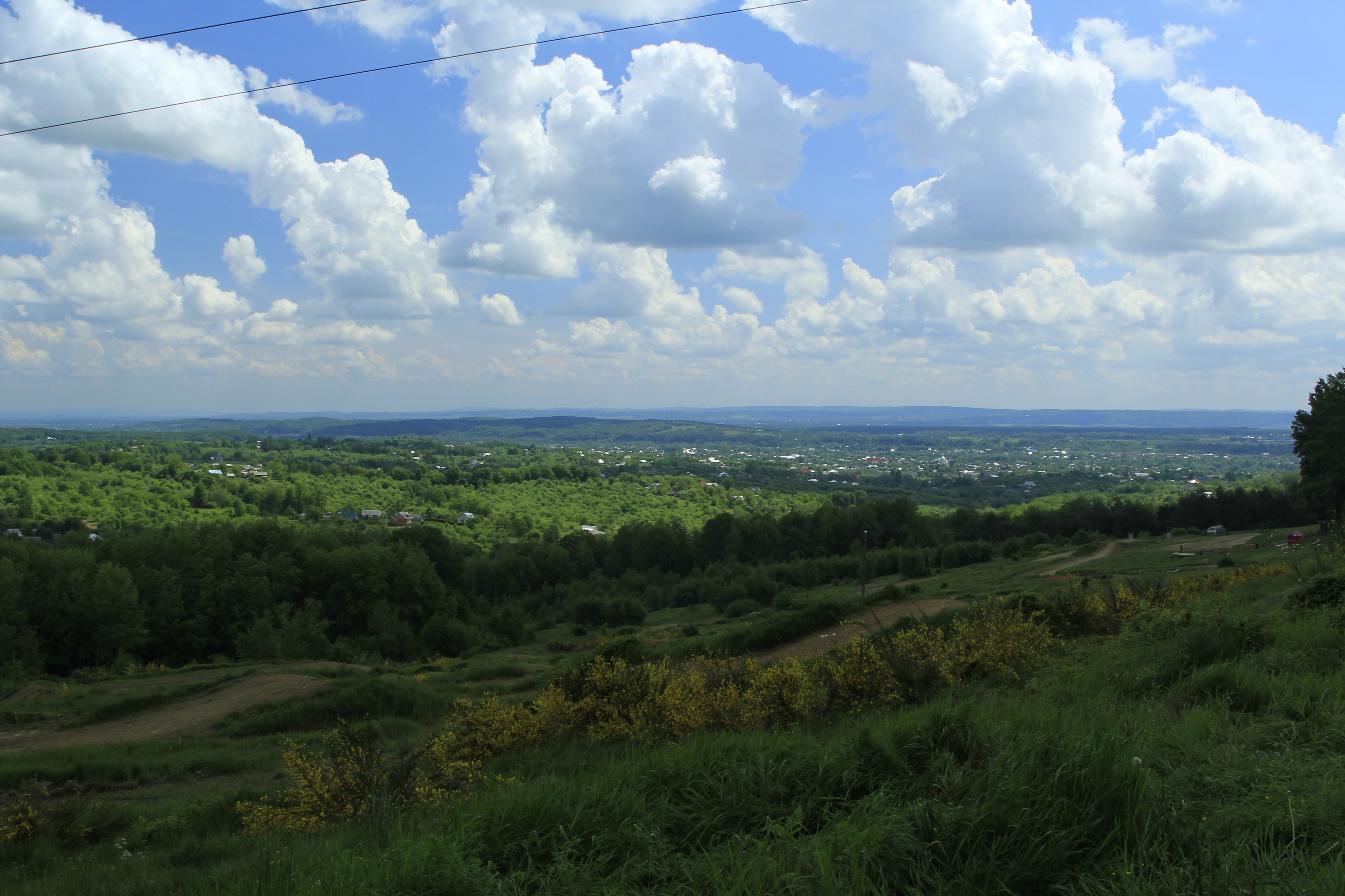 «Гуцульщина», Косівський район